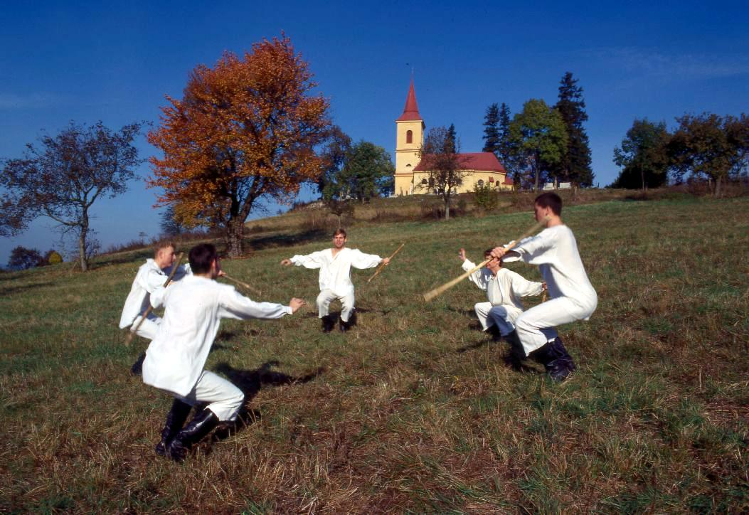 Hořeňák